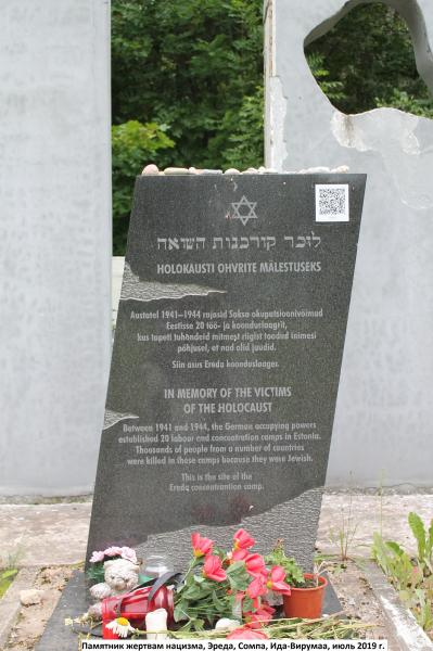 Mälestusmärk Ereda koonduslaagris viibinud vangide auks